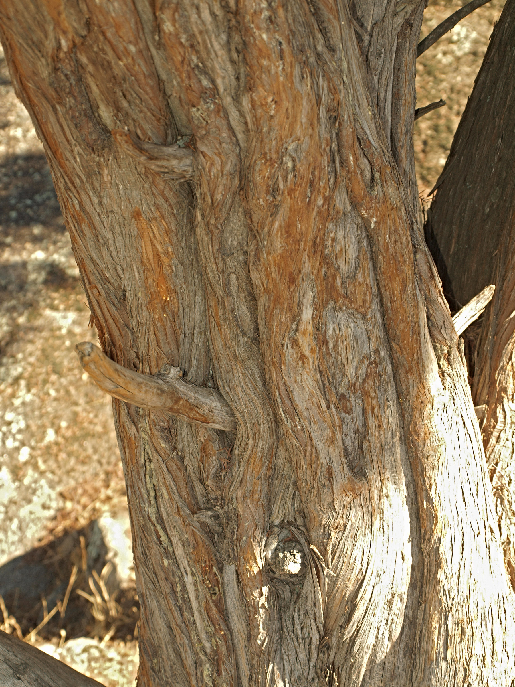 Corteza de enebro de la miera, Juniperus oxycedrus, Losar de la Vera (Cáceres, España).